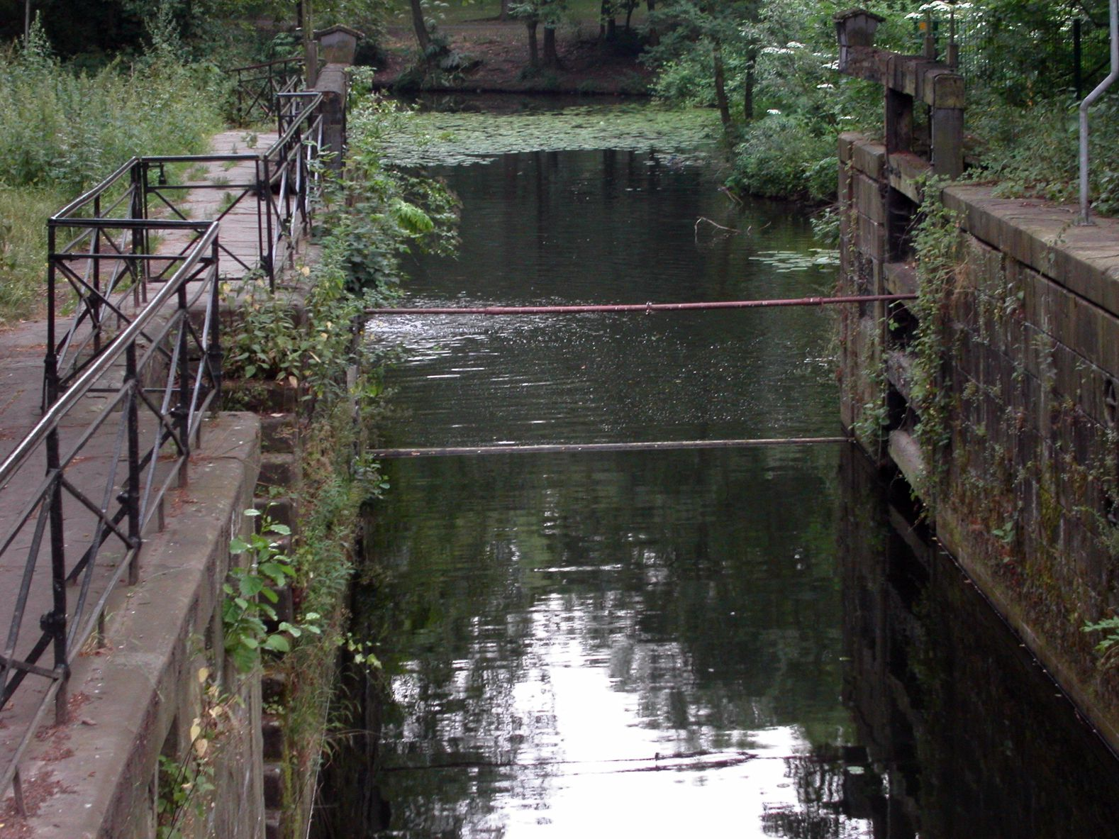 Schleuse Neukirchen